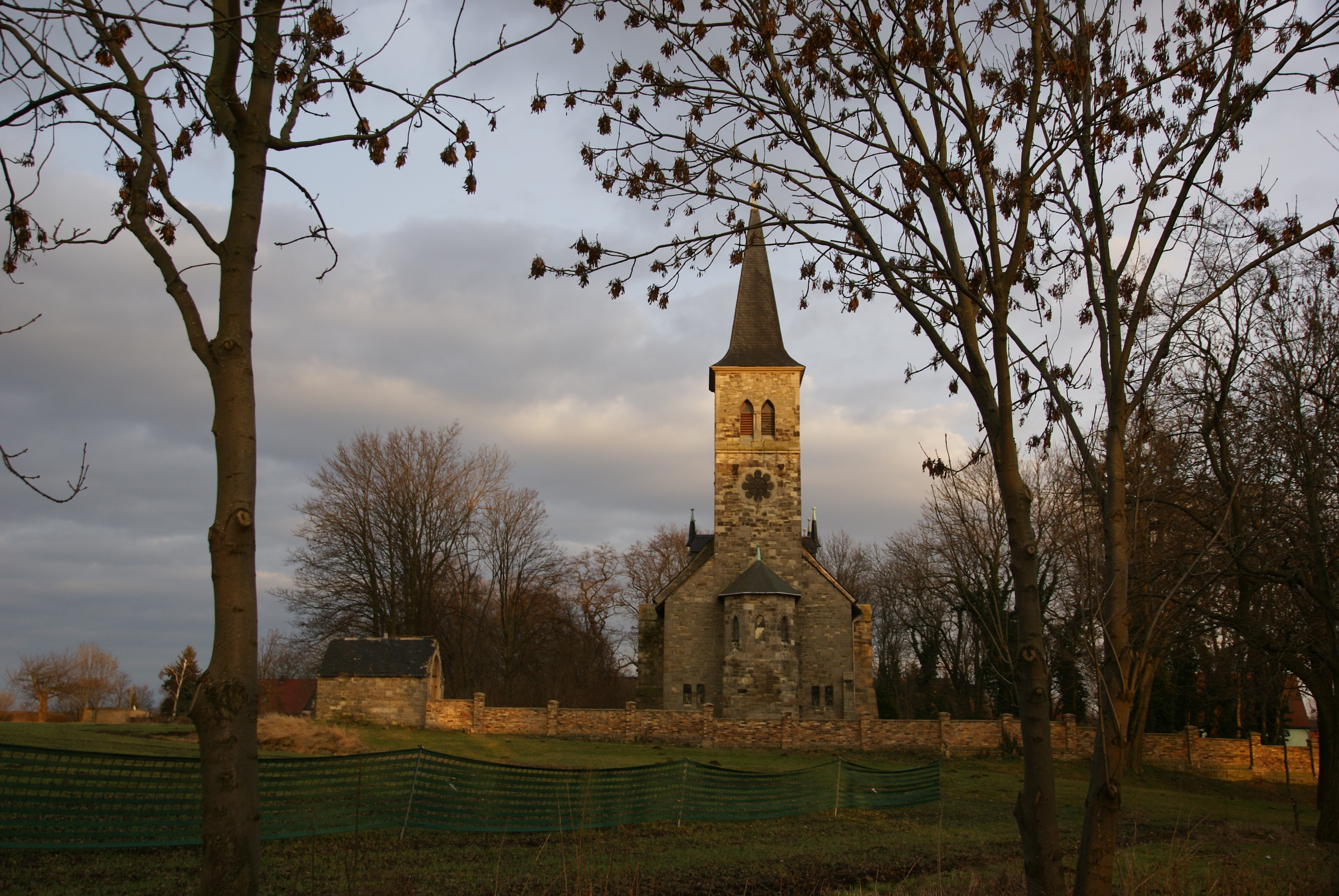 die Dorfkirche von Naundorf bei Beesenstedt